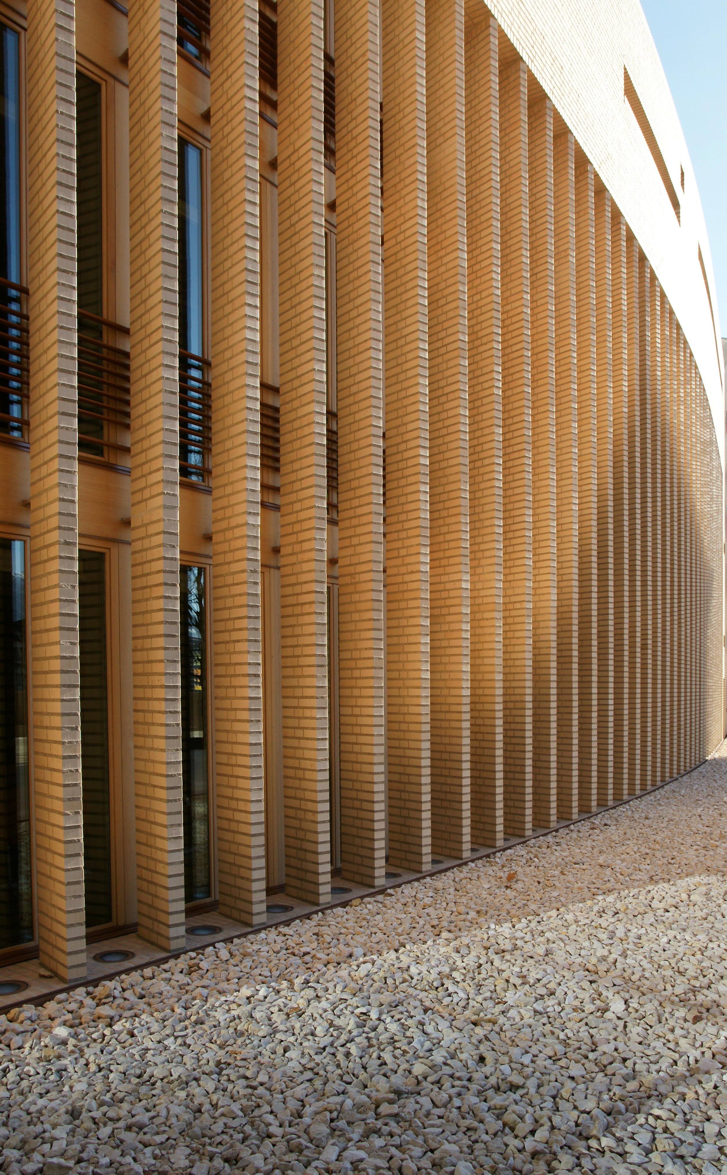 Details: Hohes Haus und Langes Haus des Liechtensteinischen Landtags in Vaduz erbaut 2007. Architekt Hansjörg Göritz.